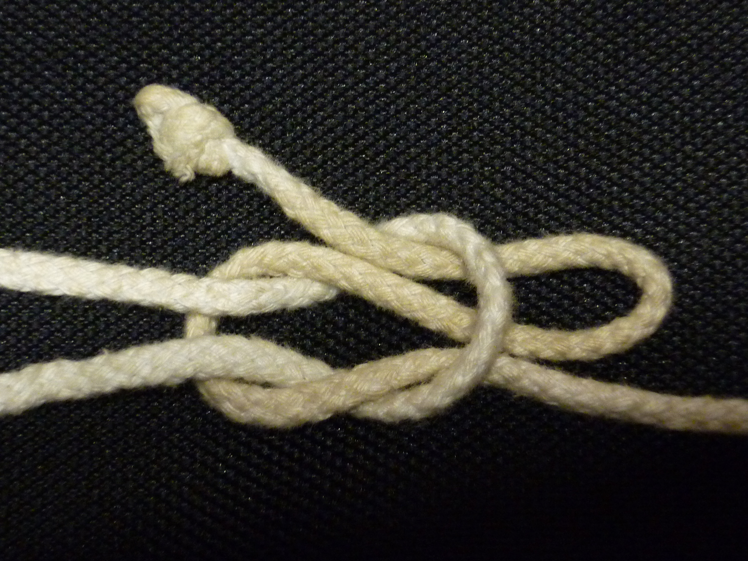 Kreuzknoten, ein Ende auf slip gelegt